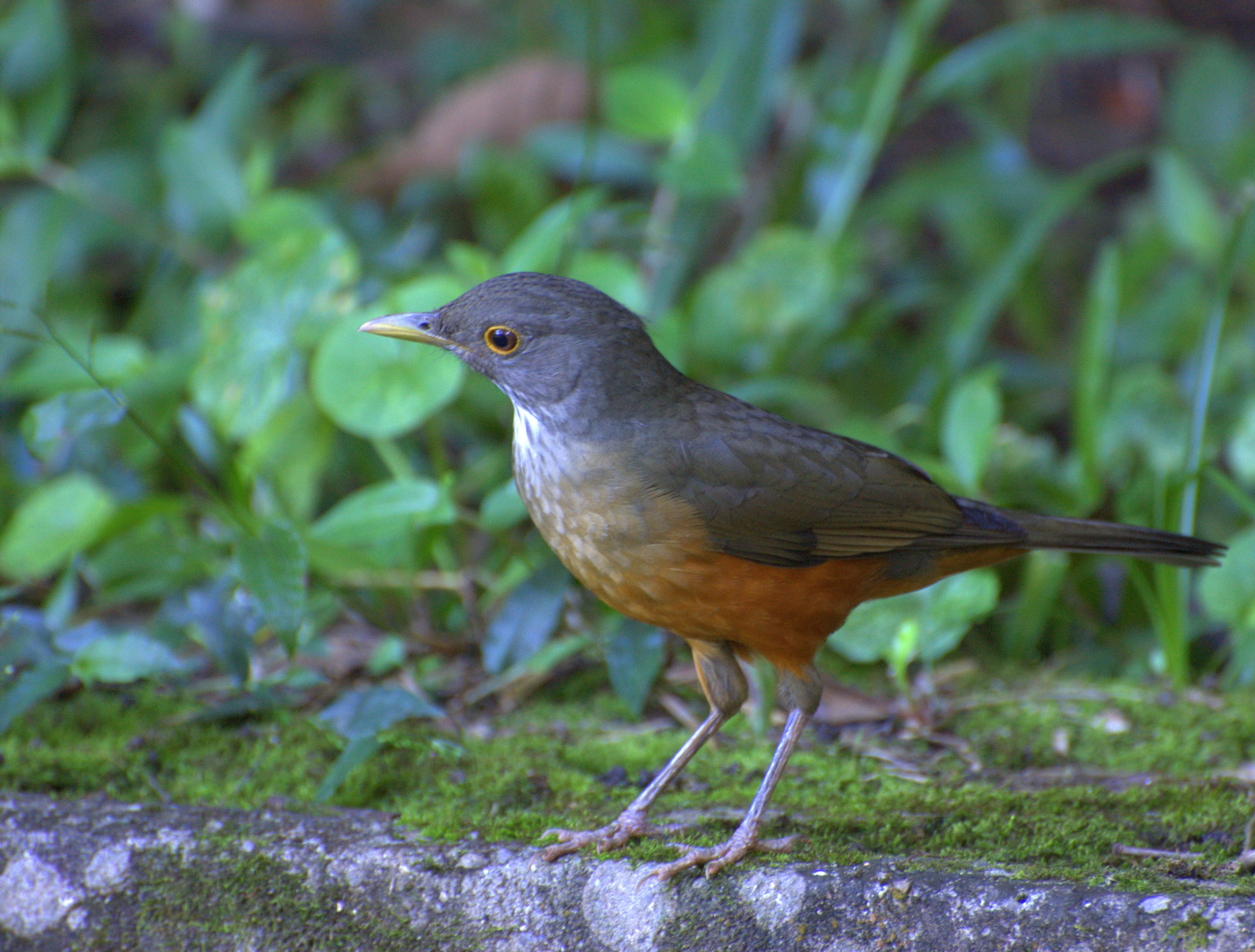 Horto Florestal de São Paulo